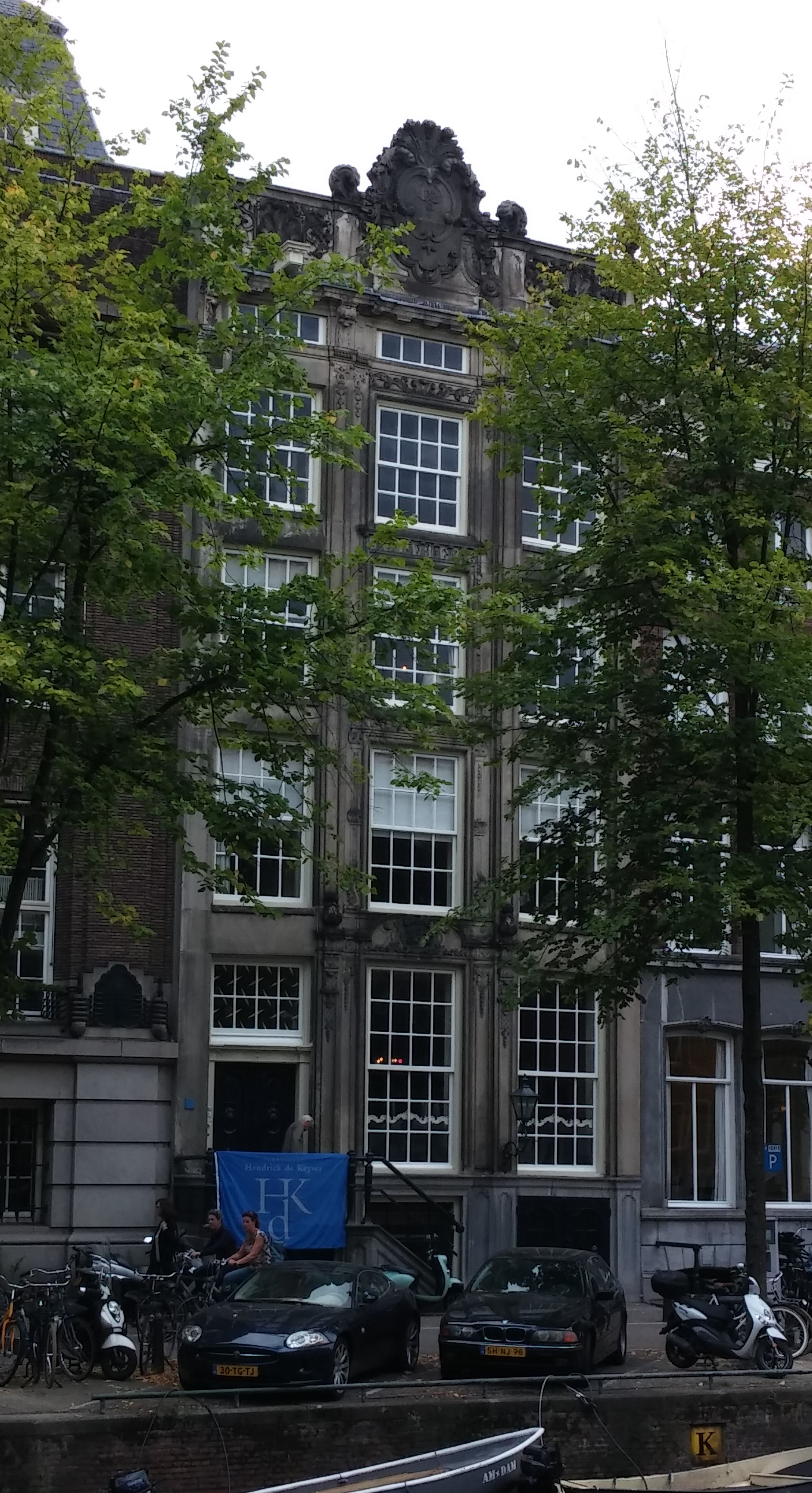 Voorgevel van Huis Van Brienen, Herengracht 284, Amsterdam.